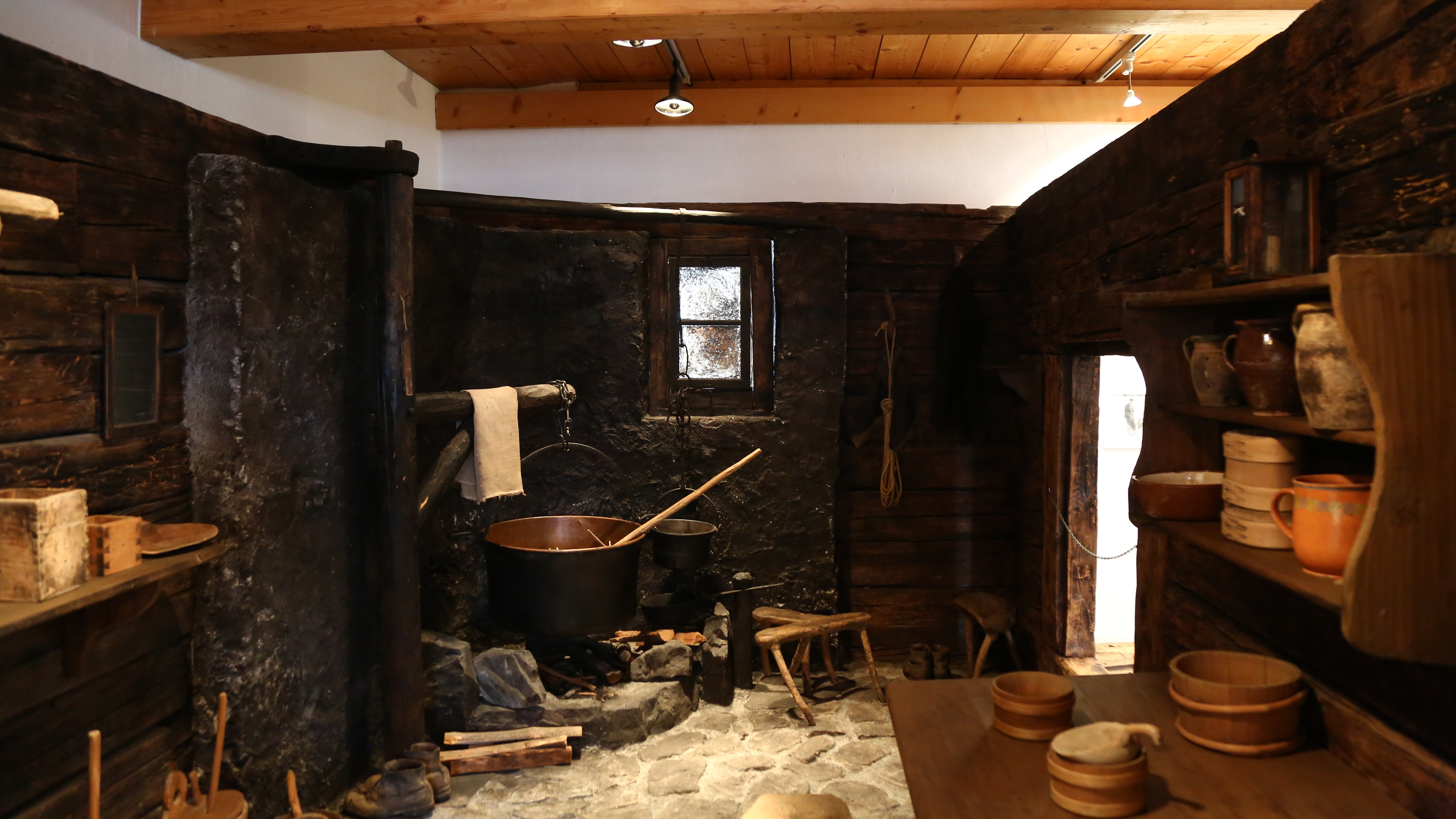 Nachbildung einer Maiensäss-Hütte im Walsermuseum Triesenberg